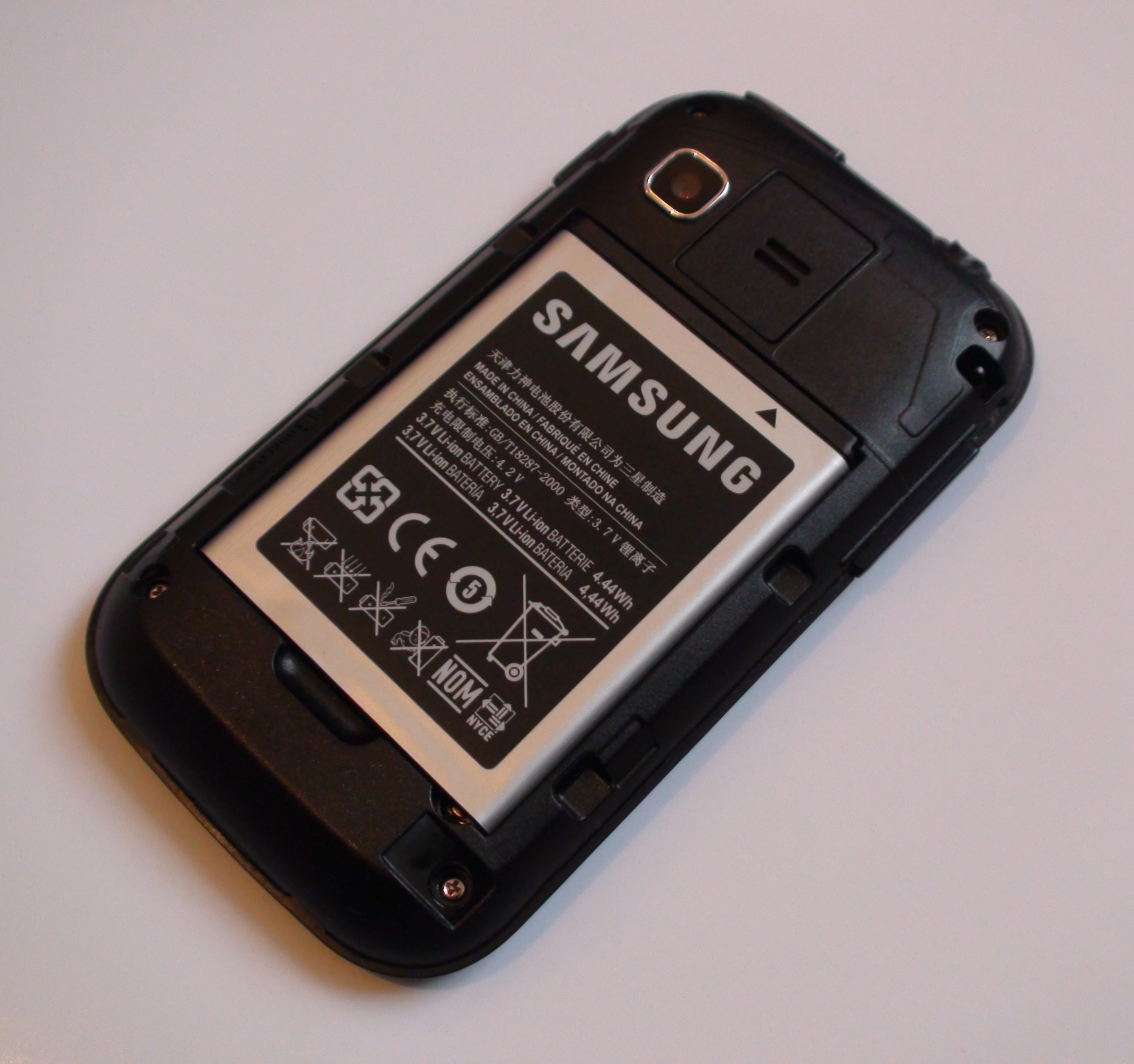 Fotografie telefonu Samsung Galaxy Pocket bez zadního krytu.